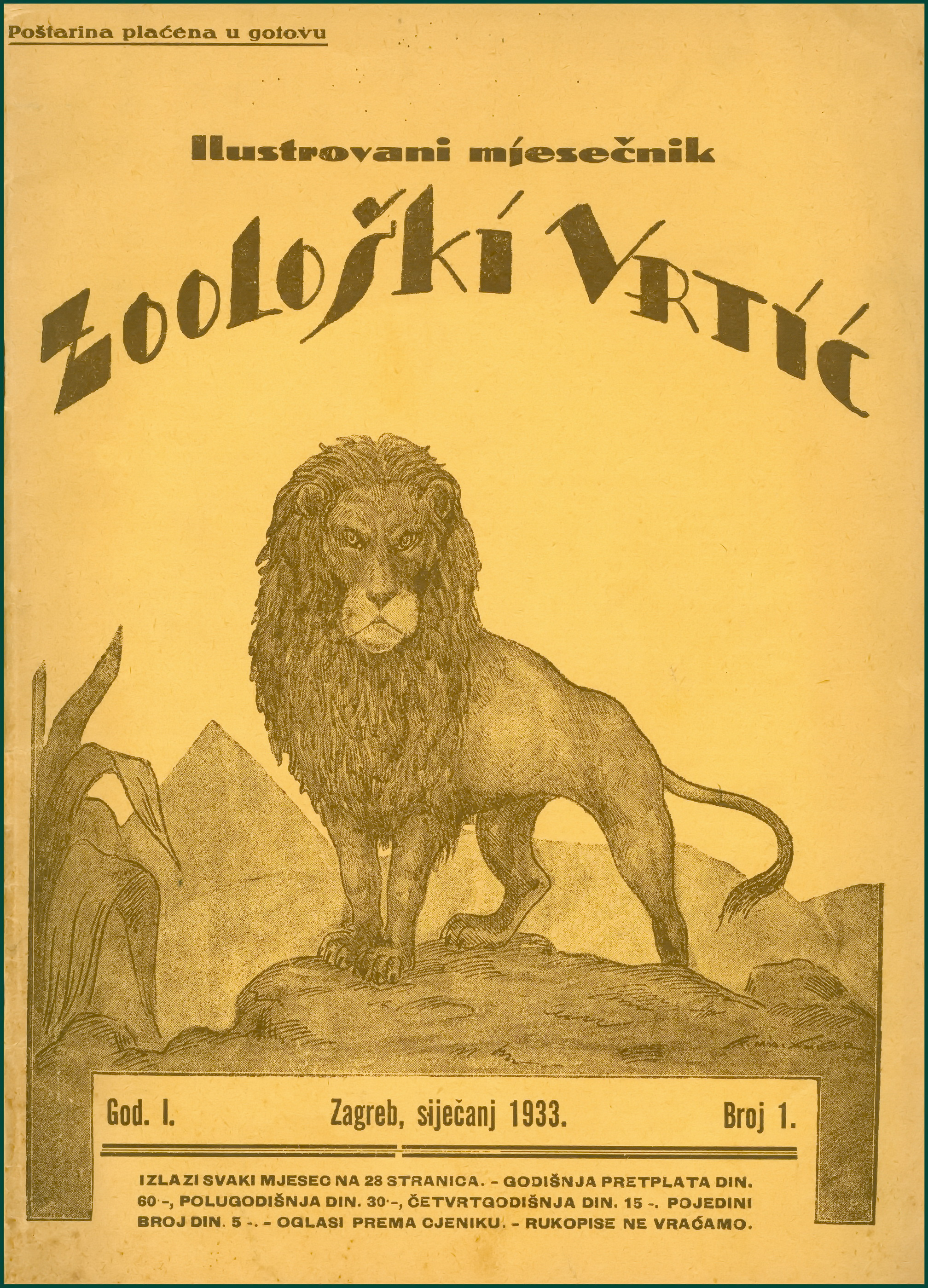 1380 T Zoo1 01 Ilustrirani mjesečnik